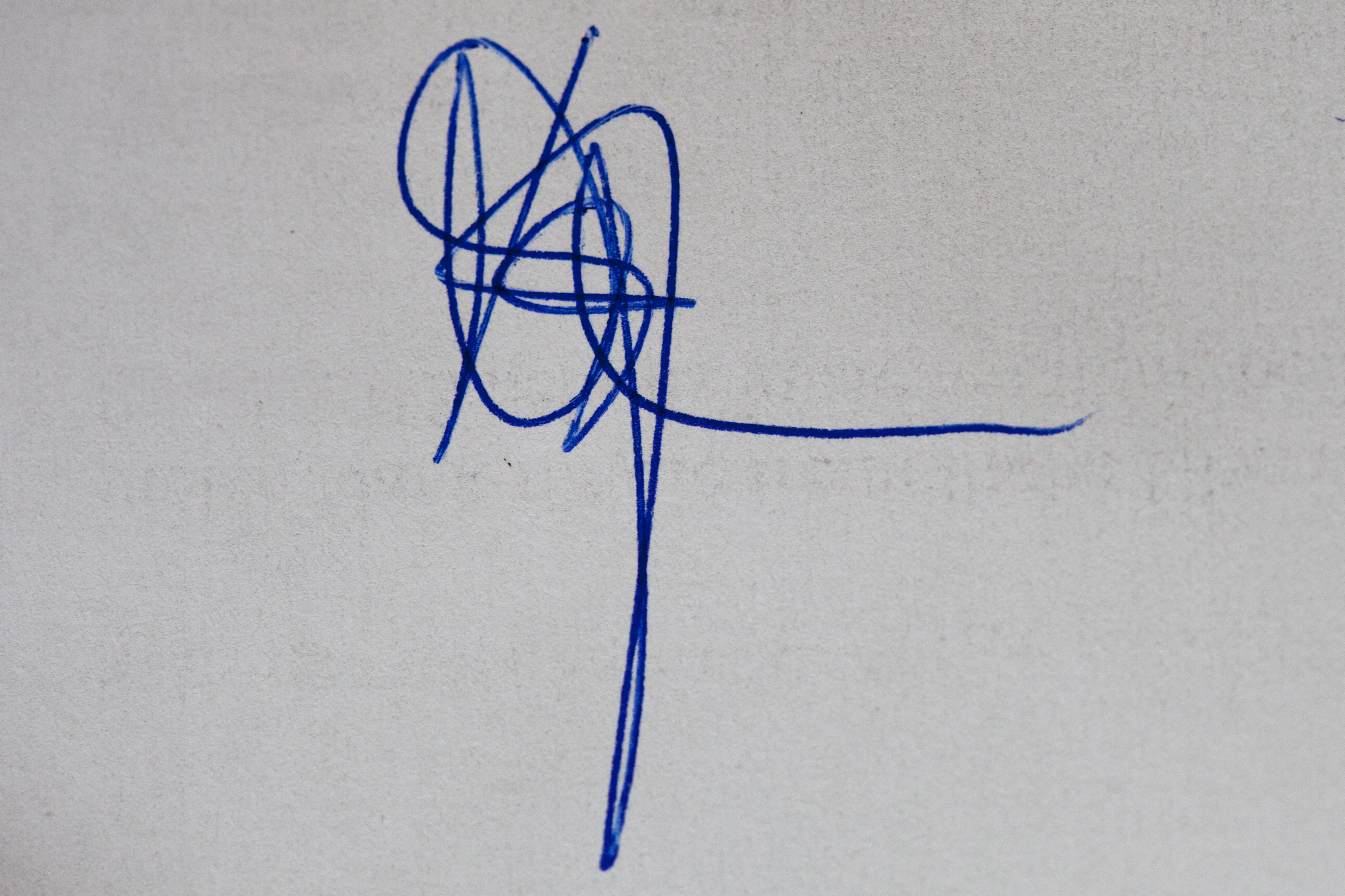 unleserliche Handzeichen, diese solltem im REchtsverkehr nicht mit einer Unterschrift verwechselt werden. Ein Vertrag mit einem Handzeichen statt mit einer irgendwie noch leserlichen Unterschrift kann einen Vertrag ungültig machen - wenn kein Notar dabei war.